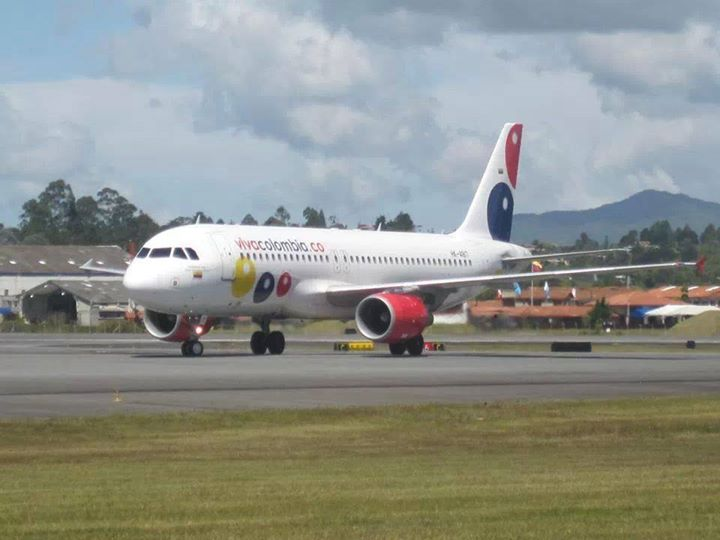 Airbus A320 de Viva Colombia rodando para puerta de embarque en el Aeropuerto Internacional Jose Maria Cordova